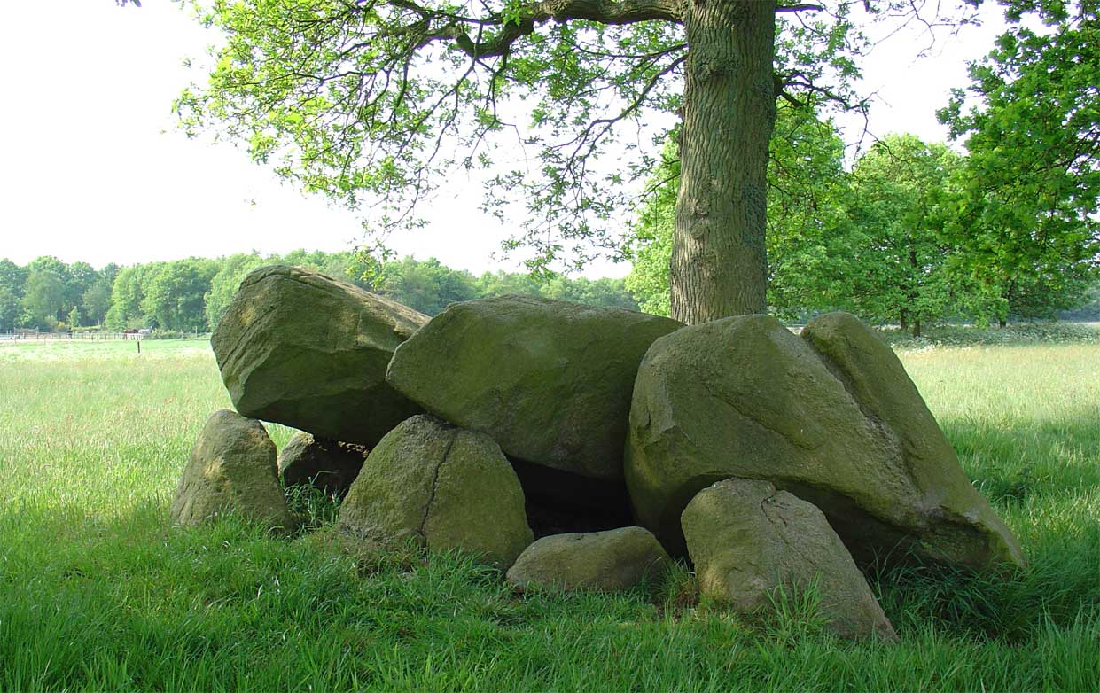 Hunebed D12 nabij Eext